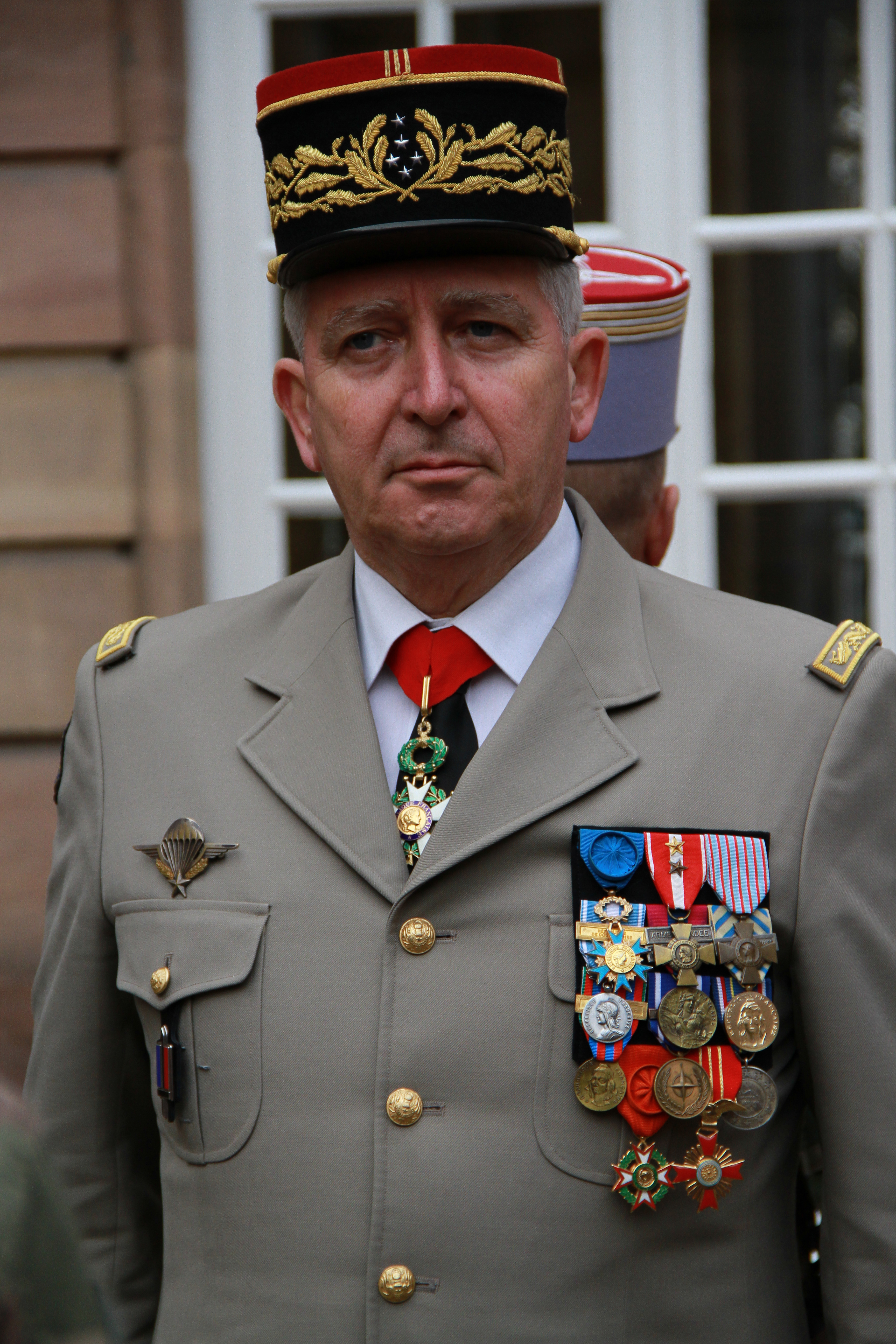 Le général d’armée Bertrand Ract-Madoux, chef d’état-major de l’armée de terre lors de la prise d'armes au Palais du gouverneur militaire de Strasbourg, le 31 janvier 2013, à l’occasion du retour en France de la Task force Lafayette.